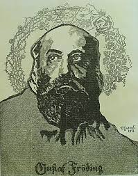 Gustaf Fjæstad: "Gustaf Fröding", träsnitt, signerad